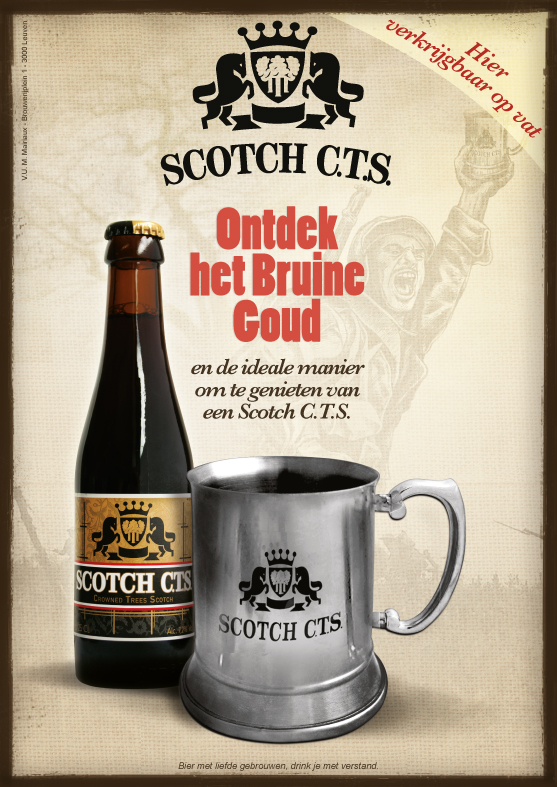 Poster NL